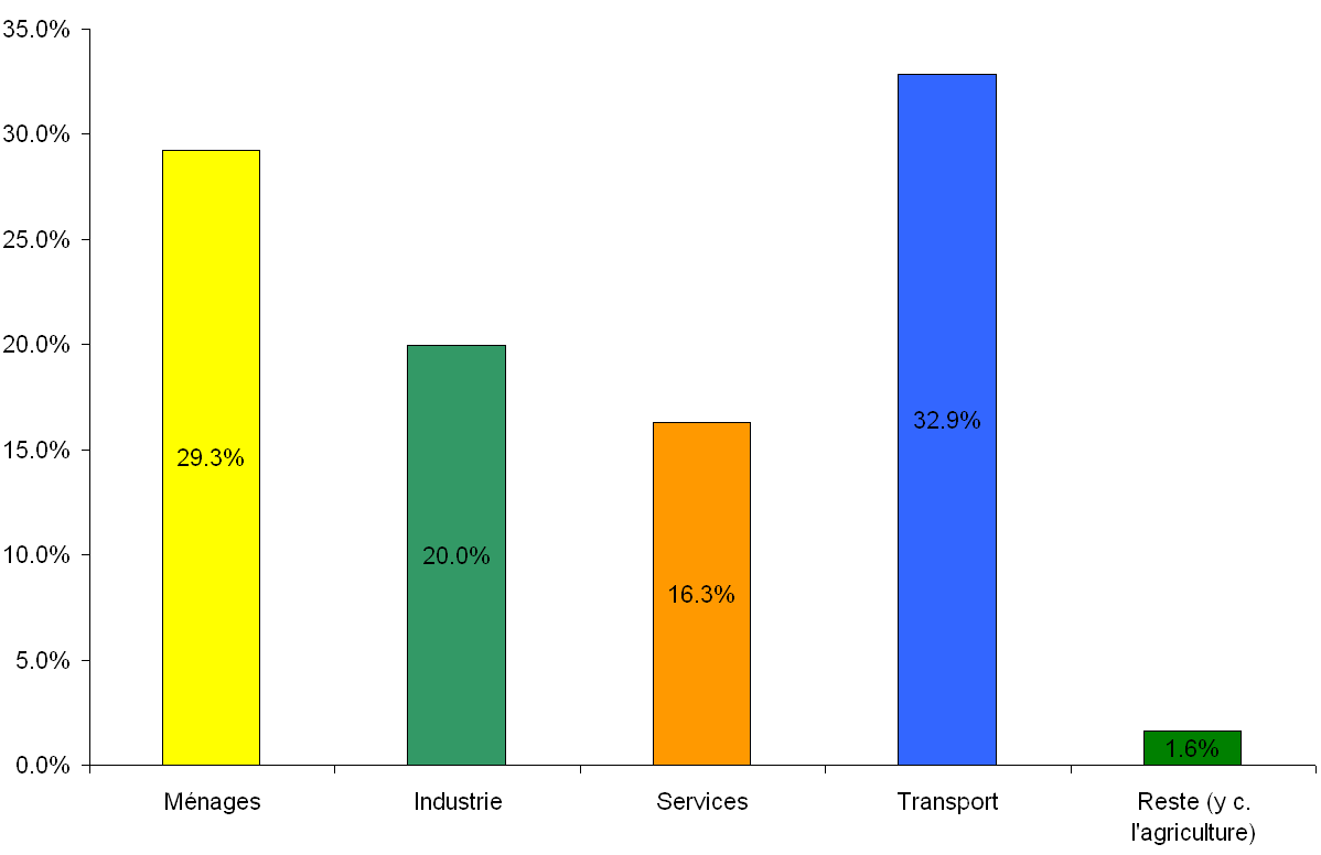 Répartition de la consommation finale en énergie, selon les groupes de consommation. Suisse année 2007.